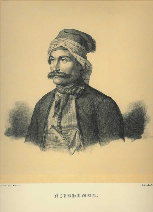 Aπό: Bildnisse ausgezeichneter Griechen und Philhellenen nebst einigen Ansichten und Trachten. Nach der Natur gezeichnet und herausgegeben von Karl Krazeisen. Munchen 1831